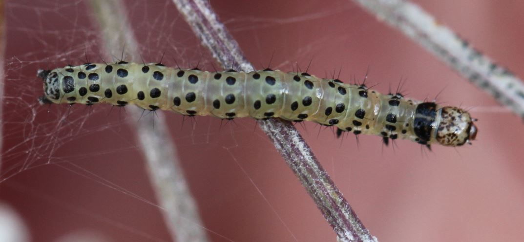 Raupe des Möhrenzünslers (Sitochroa palealis) an Wilder Möhre am 1.9.2017 in der Schwetzinger Hardt